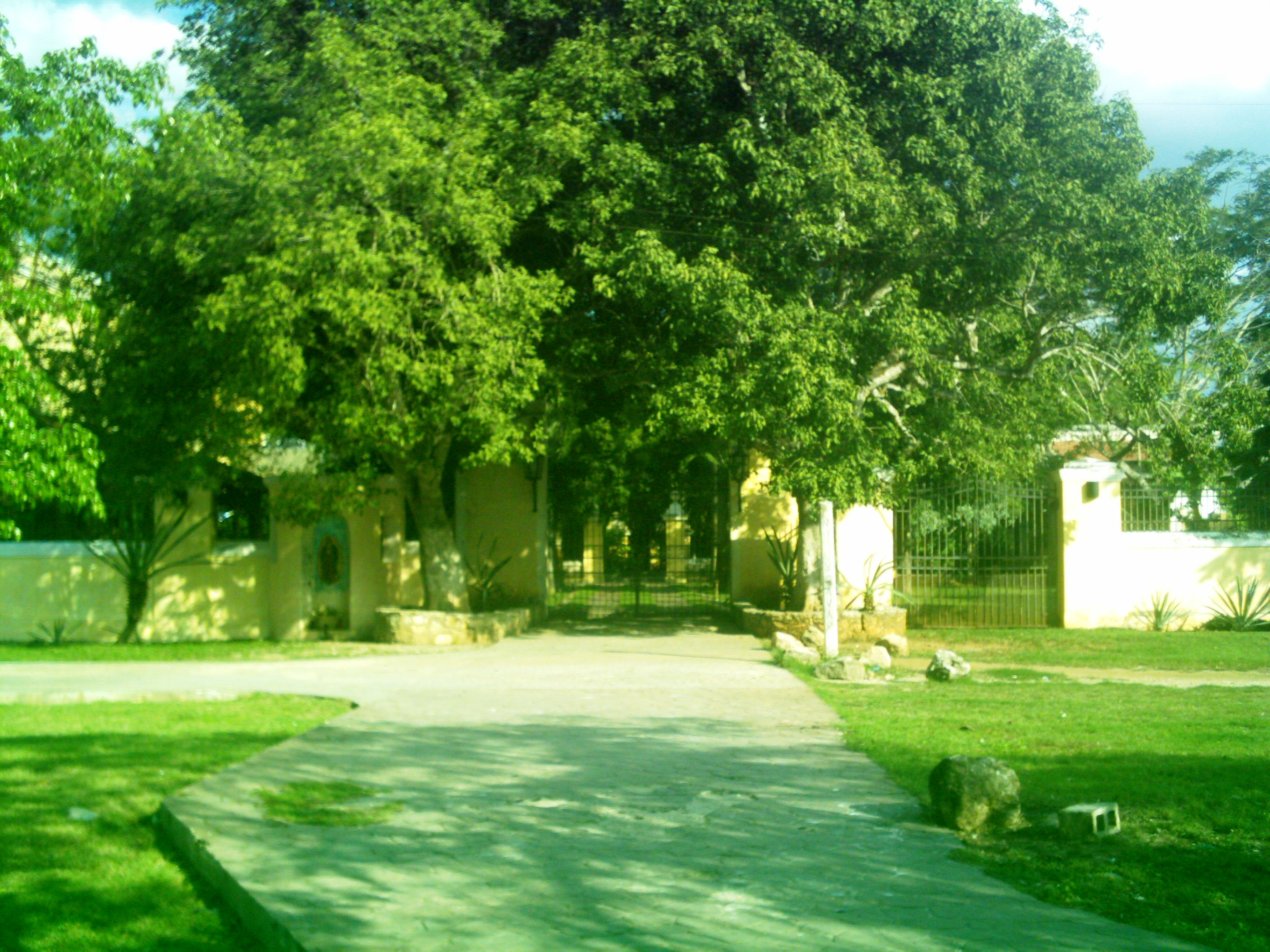 Hacienda de Xcanatún, Yucatán.